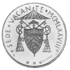 Ватикан. 500 лир 1978, серебро. Вакантный престол 1